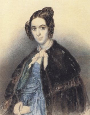 Варвара Николаевна Репнина-Волконская(1809 - 1891) - писательница, фрейлина. Portrait of Varvara Volkonskaya Repnina